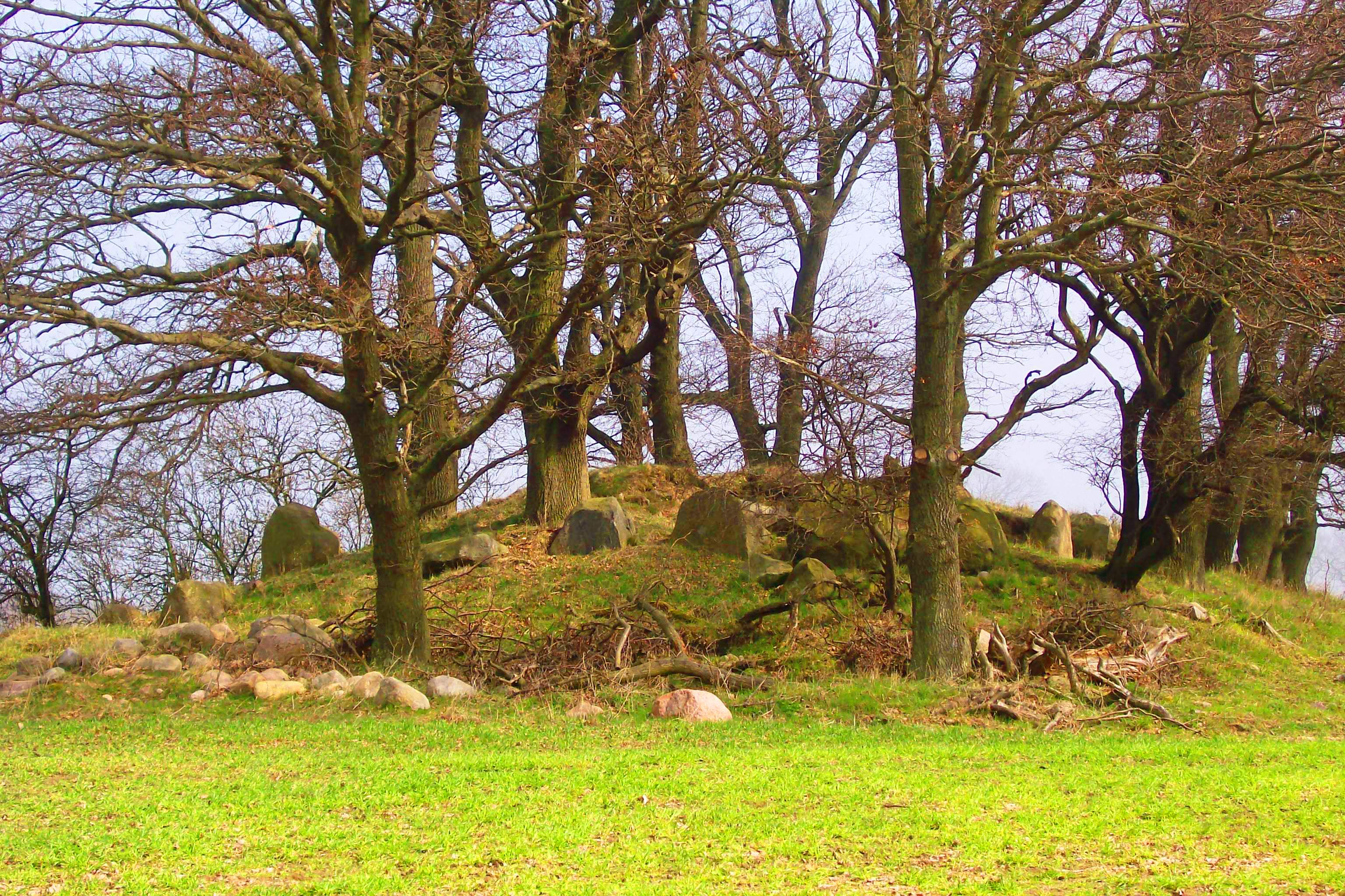 Großsteingrab bei Nadelitz -Rügen